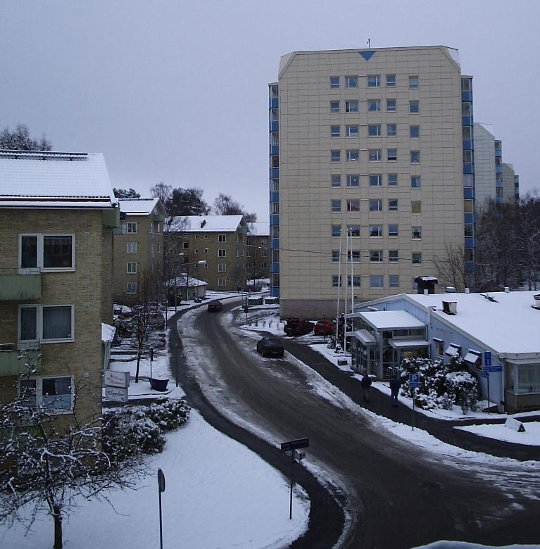 Kalendervägen i Kortedala den 21 december 2004, en bild tagen av Harri Blomberg.